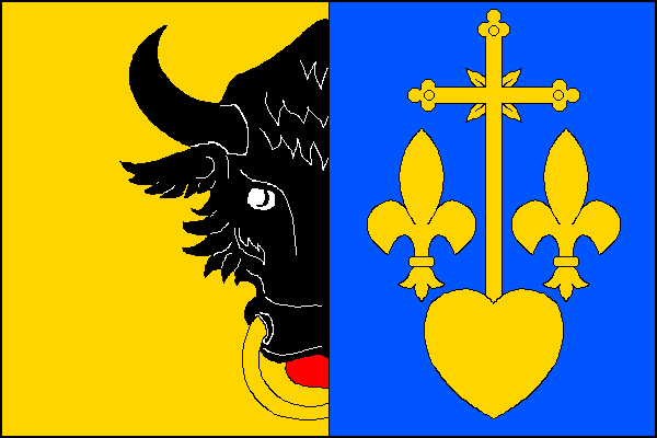 vlajka,Rozsochy , okres Žďár nad Sázavou